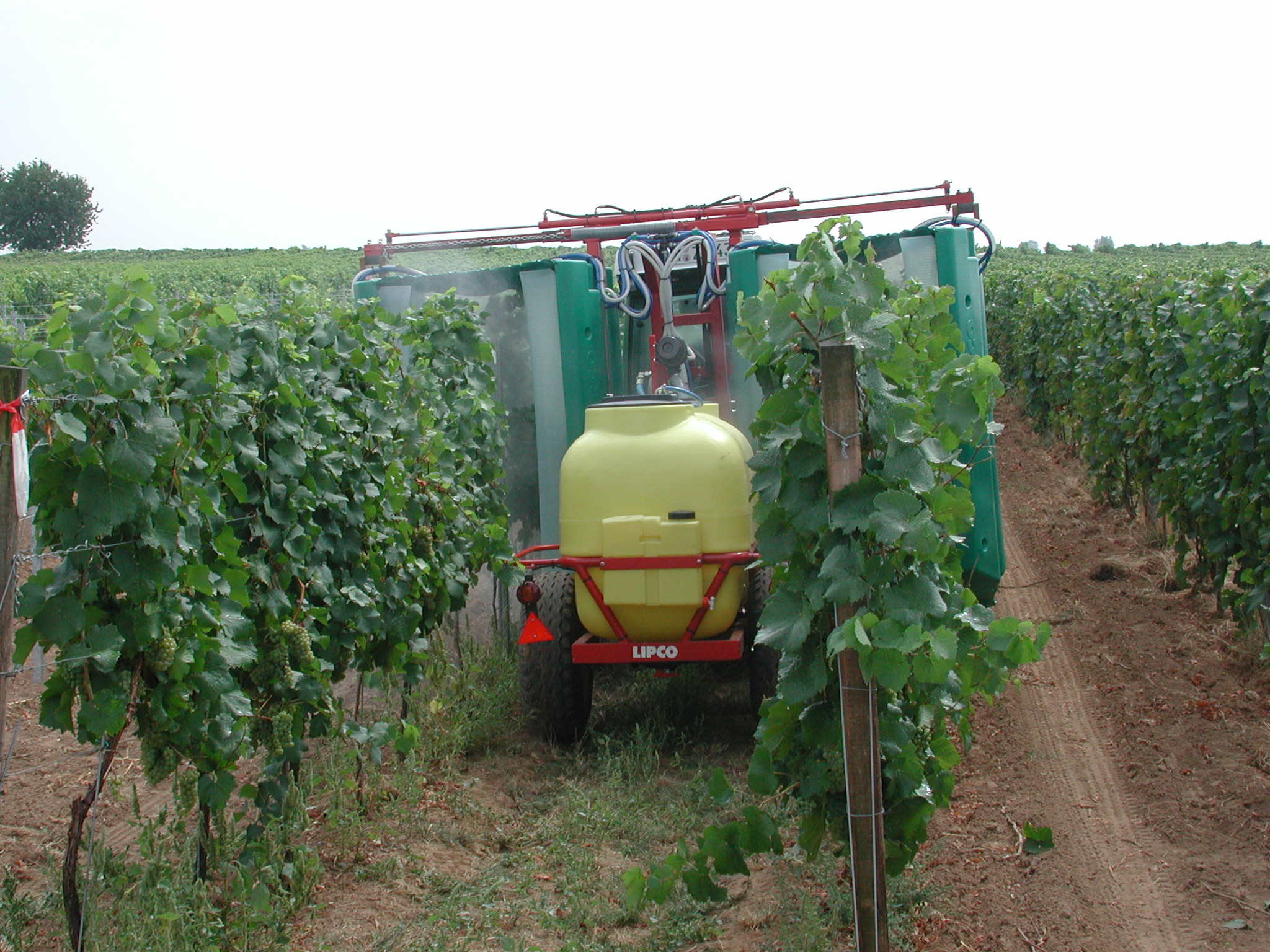 Tunnelspritzgerät zur Ausbringung von Pflanzenschutzmitteln in Raumkulturen - hier in einem Weingarten